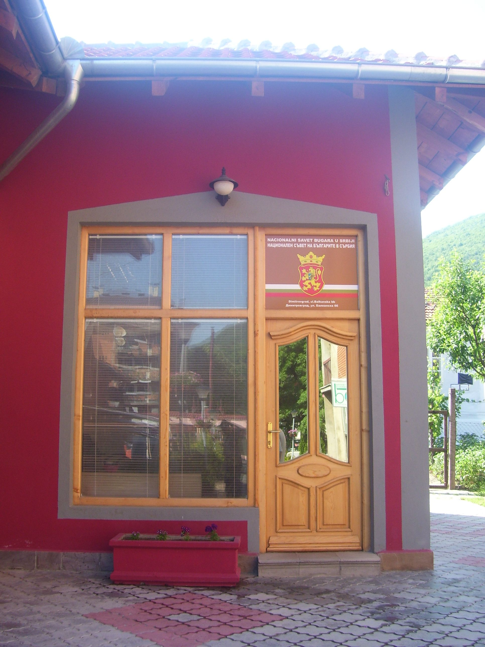 Сградата на Националния съвет на българите в Сърбия в Цариброд.